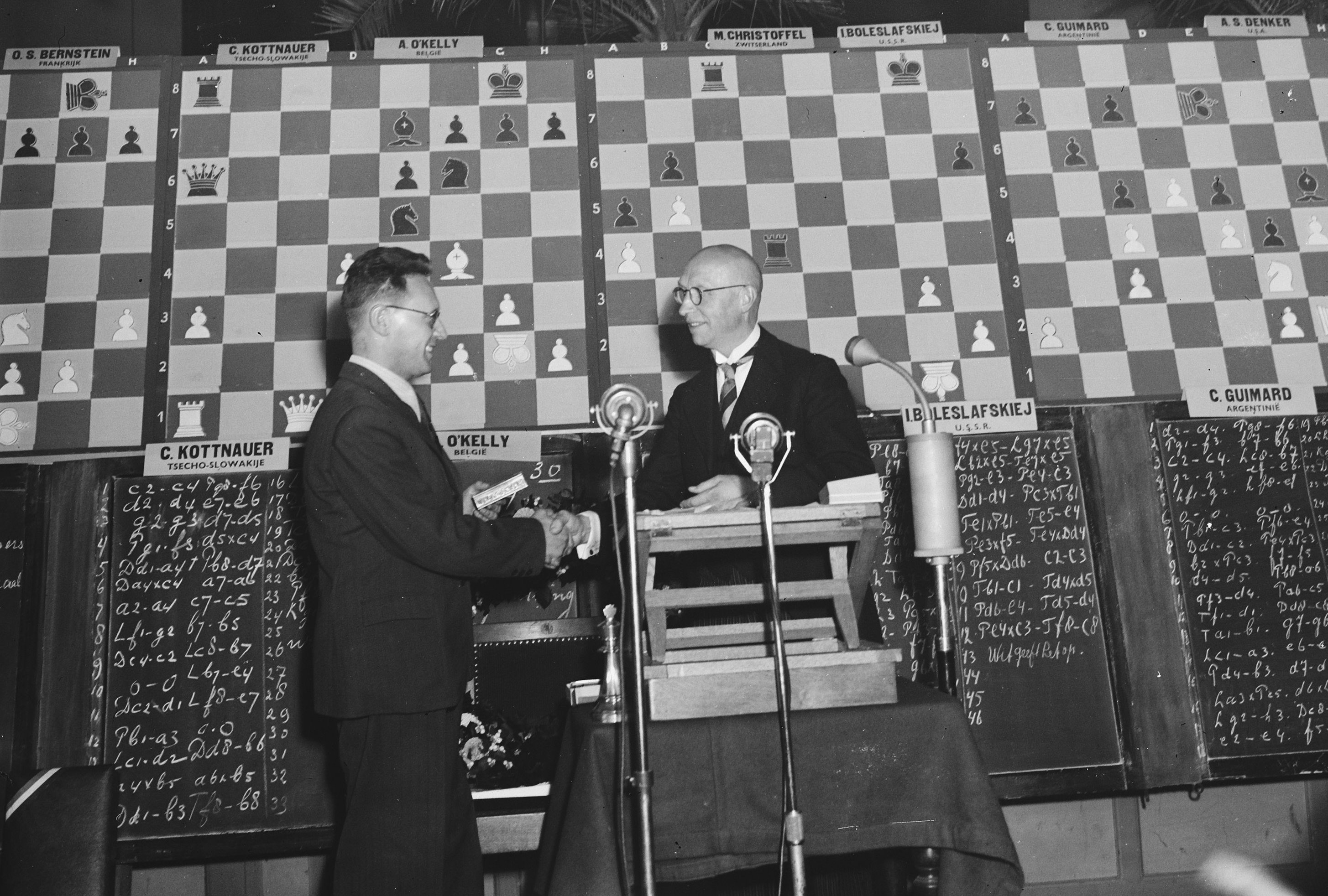 Staunton schaaktoernooi in Groningen (Hotel Frigge); winnaar Botwinnik. 6 september 1946